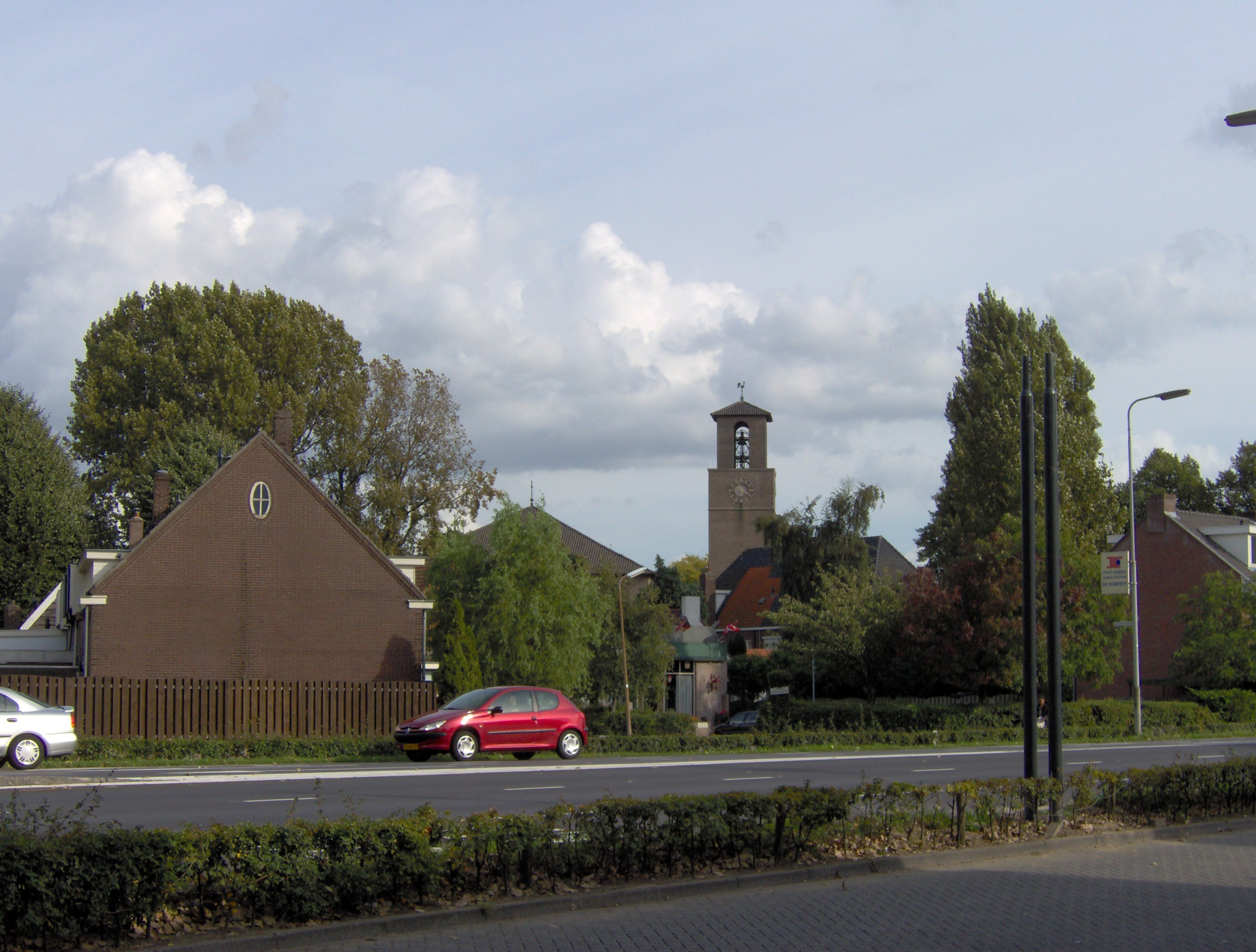 eigen foto